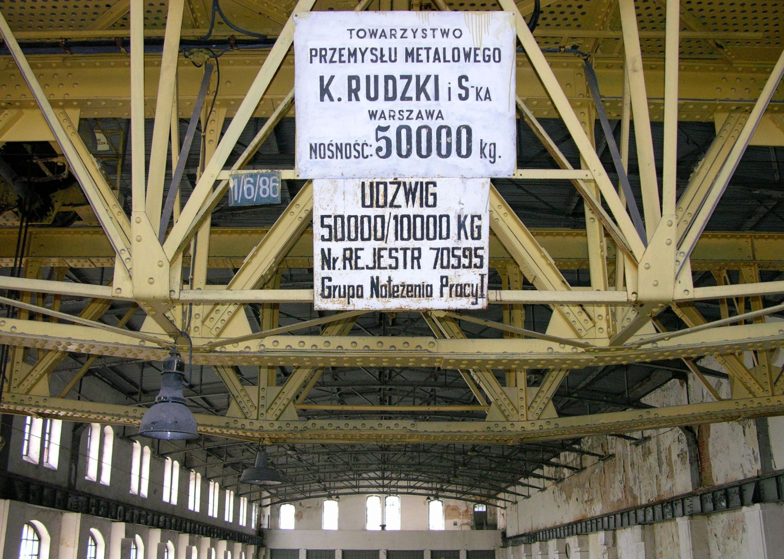 Była elektrownia EC1 w Łodzi